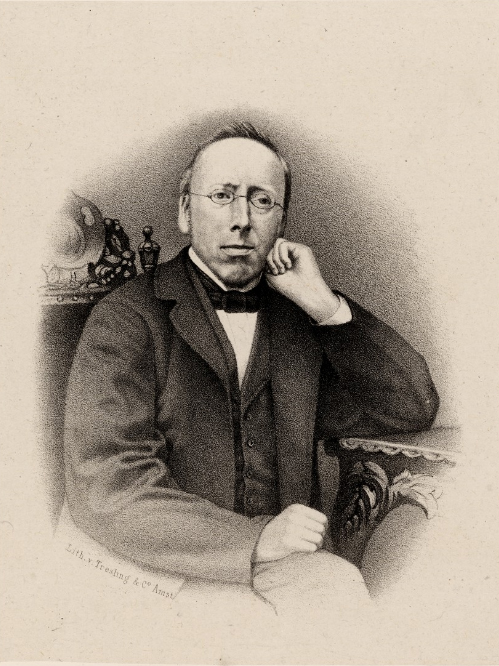 Portret van de Arnhemse uitgever Paulus Nijhoff (1821-1867)